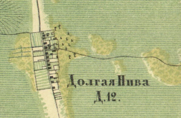 Деревня Долгая Нива на карте 1860 года.